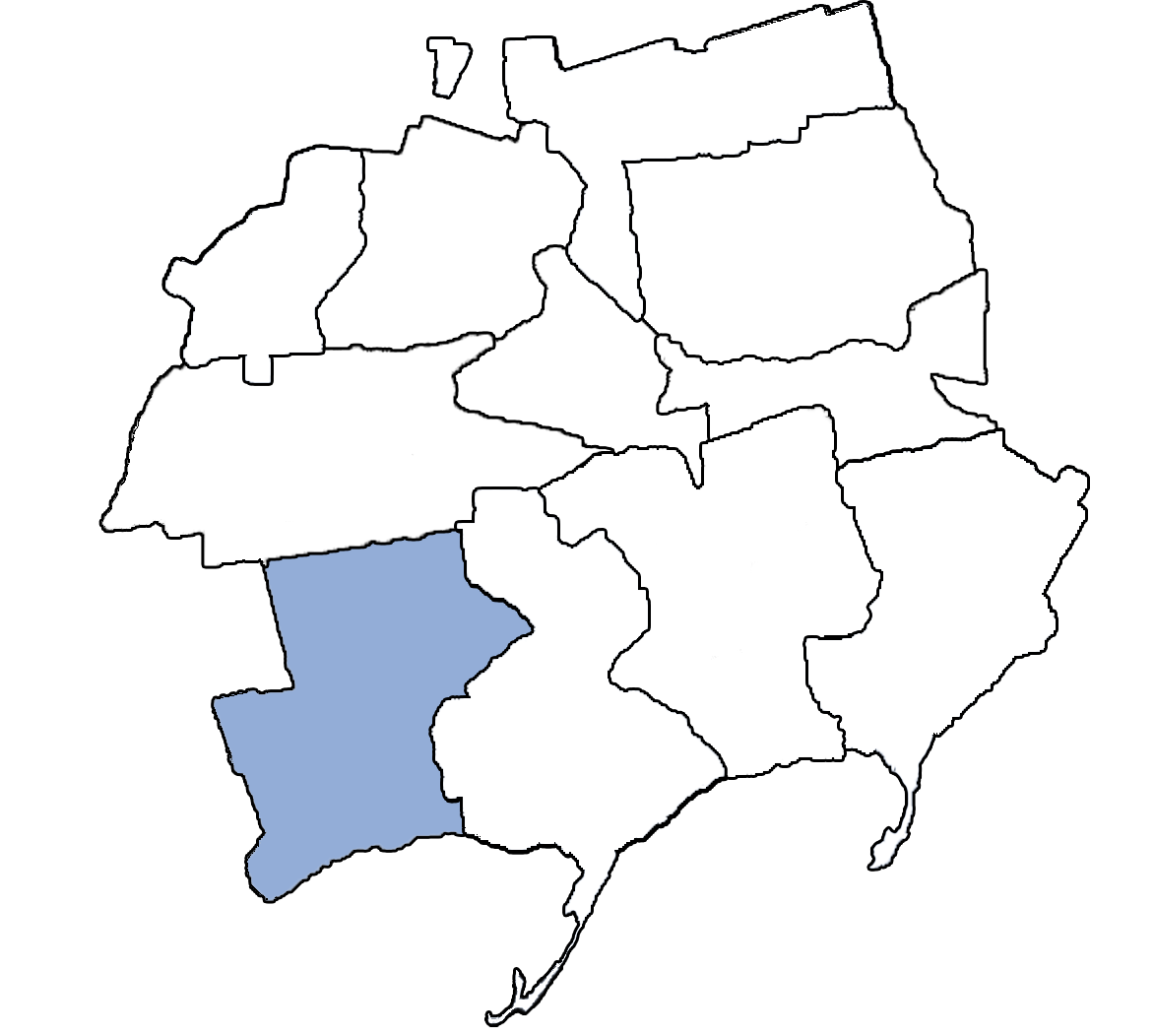 Карта Бердянської округи Цареводарівського району